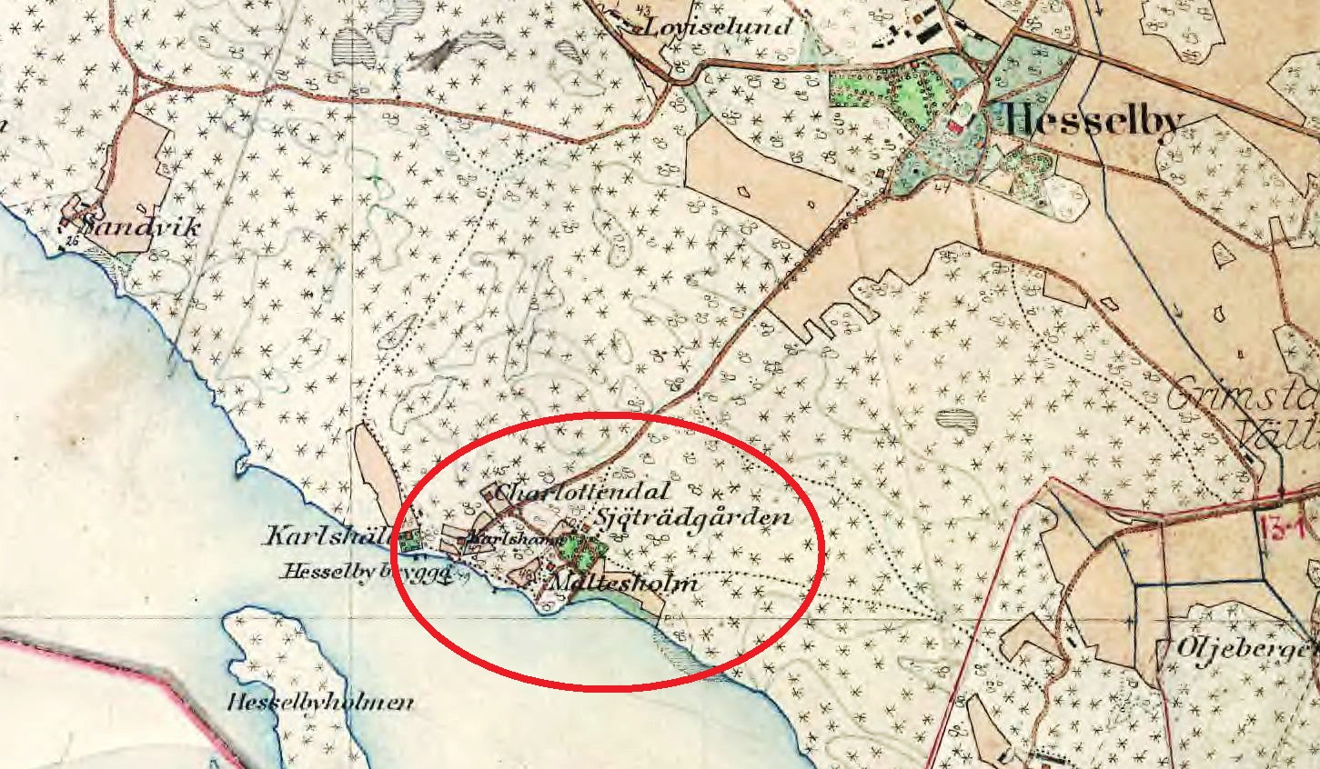 Hässelby slott och Sjöträdgården